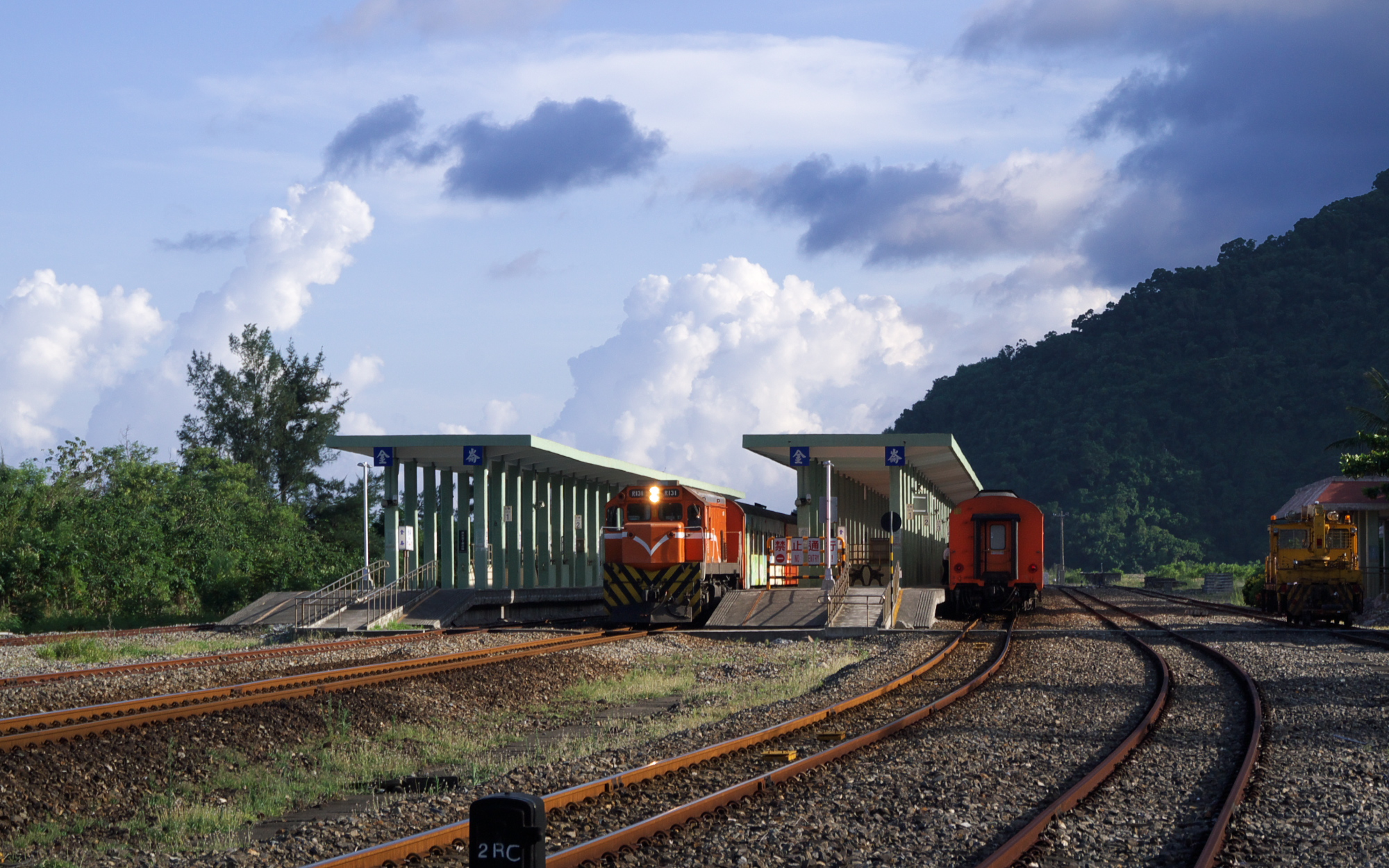 金崙車站由北方拍攝月台